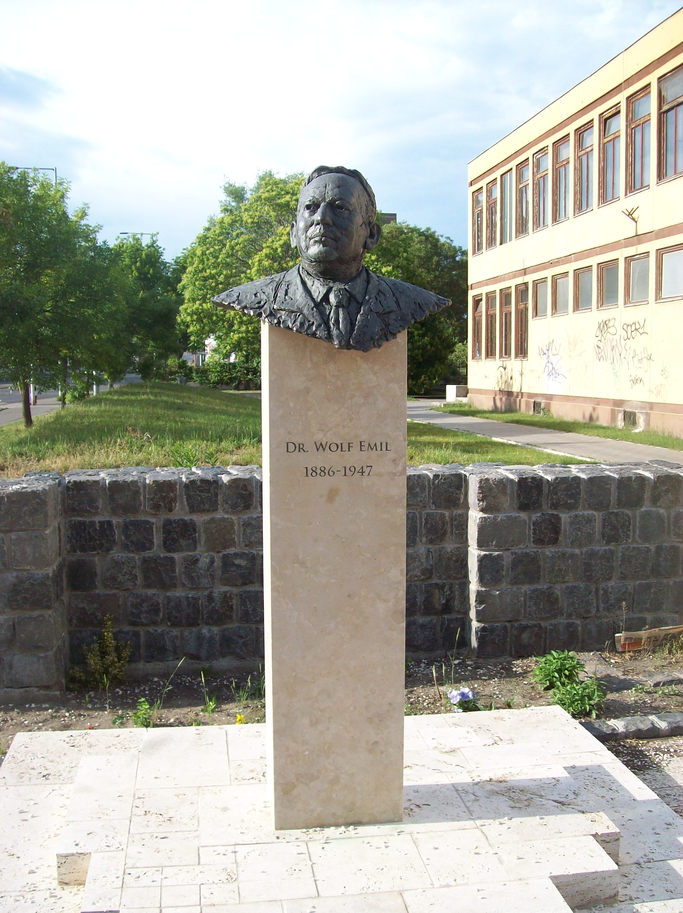 Wolf Emil vegyészmérnök szobra Újpesten (Budapest)